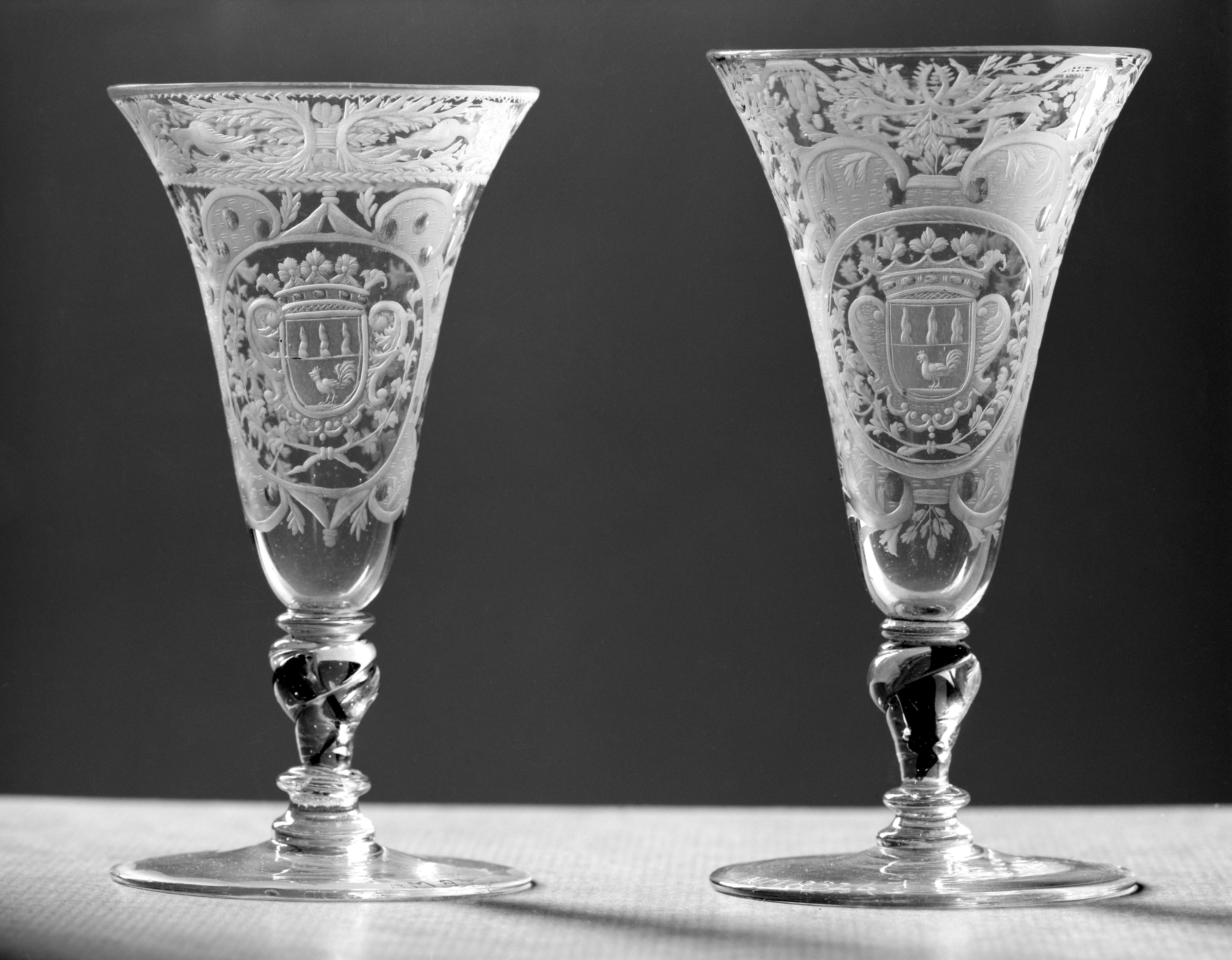 IdentificatieTitel(s): Kelkglas met het wapen van de familie Van BeuningenObjecttype: kelkglas Objectnummer: BK-NM-13085Omschrijving: Kelkglas van helder, kleurloos glas. Platte voet. De gedraaide, balustervormige stam heeft een rode spiraal, een luchtbel en drie mereses. De trompetvormige kelk heeft een afgeronde bodem. Op de kelk, in een cartouche bestaande uit voluten met gematteerde vlakken met stippen en cirkeltjes, omgeven door bladwerk, bevindt zich een ovaal medaillon met het gekroonde familiewapen Van Beuningen, geflankeerd door twee takken die aan de onderzijde aan elkaar gebonden zijn. Langs de mondrand een band met symmetrisch bladwerk en bloemtakken en twee duiven tussen een kartelrand en een gestileerde tak met bladeren. De voet is afgezet met een band bestaande uit gematteerde halve ovalen.VervaardigingVervaardiger: glasblazer: anoniemglasgraveur: anoniemPlaats vervaardiging: glasblazer: Bohemenglasgraveur: Dresden (mogelijk)Datering: ca. 1700 - ca. 1725Fysieke kenmerken: helder, kleurloos glas met radgravureMateriaal: glas Techniek: radgravure / glasblazenAfmetingen: h 11,5 cm. × d 6,2 cm. (kelk) × d 5,8 cm. (voet)Verwerving en rechtenCredit line: Legaat van de heer R. van Beuningen van HelsdingenVerwerving: legaat 1923Copyright: Publiek domein